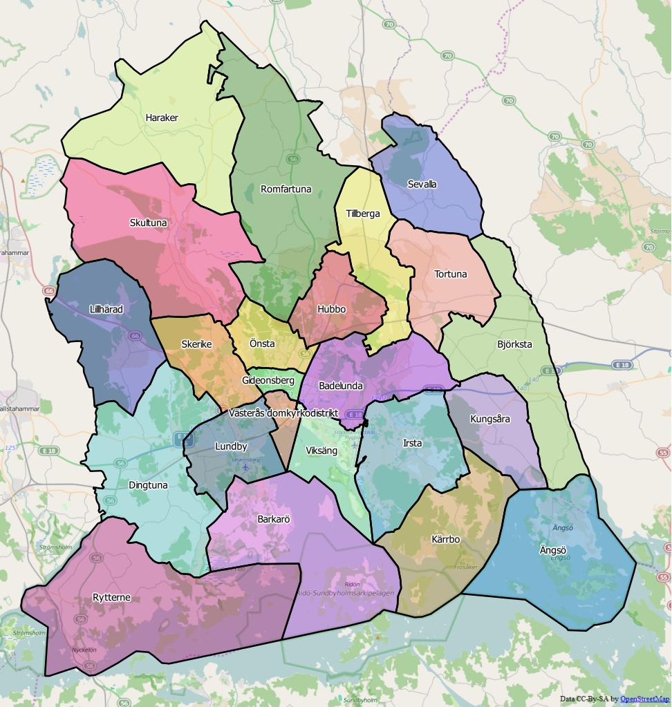 Distriktsindelningen i Västerås kommun World file 91.44178538739622297 0 0 -91.44178538739622297 1804498.23189235432073474 8368196.37669079005718231